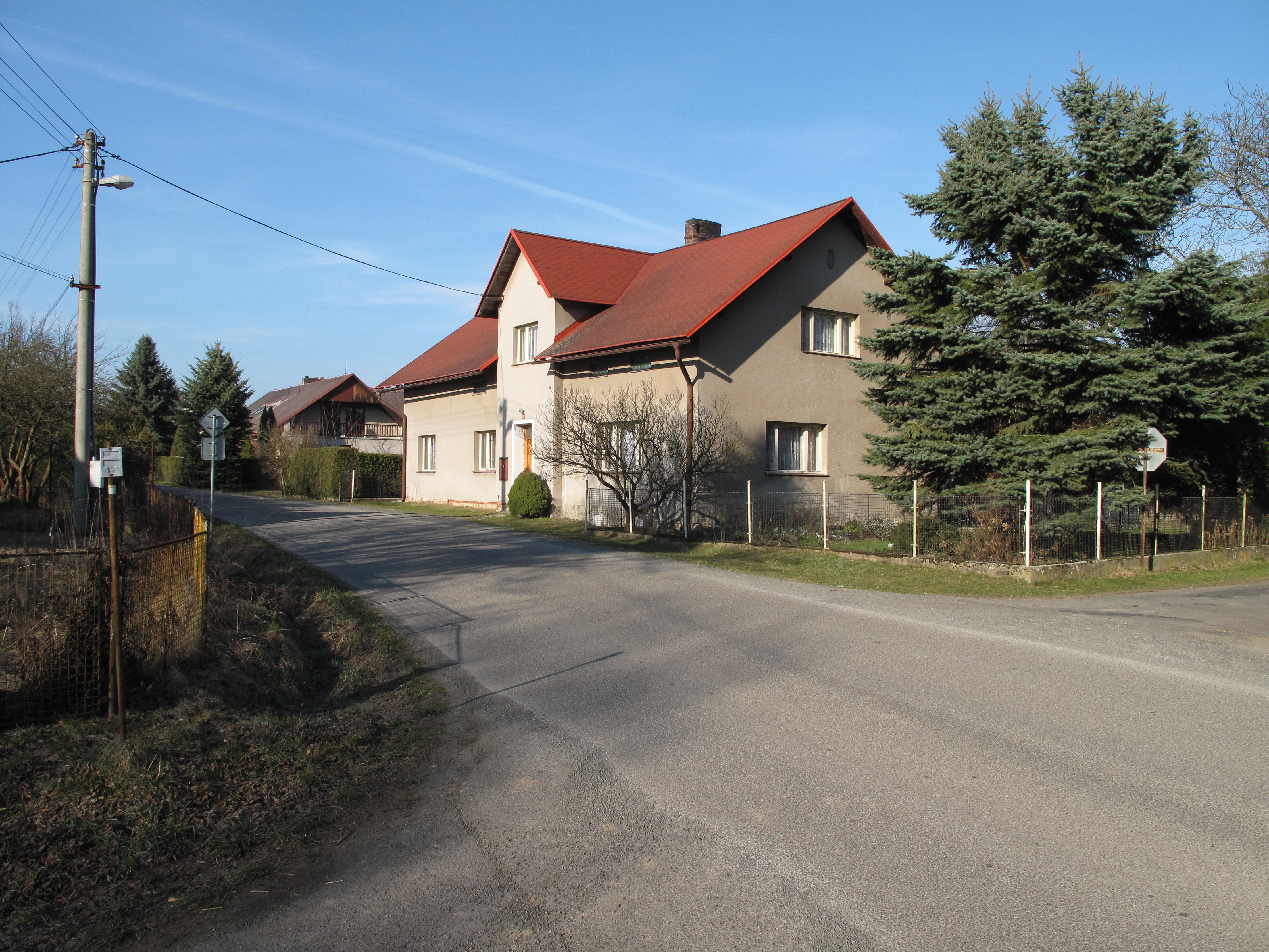 Dům v Malčicích. Okres Liberec, Česká republika.